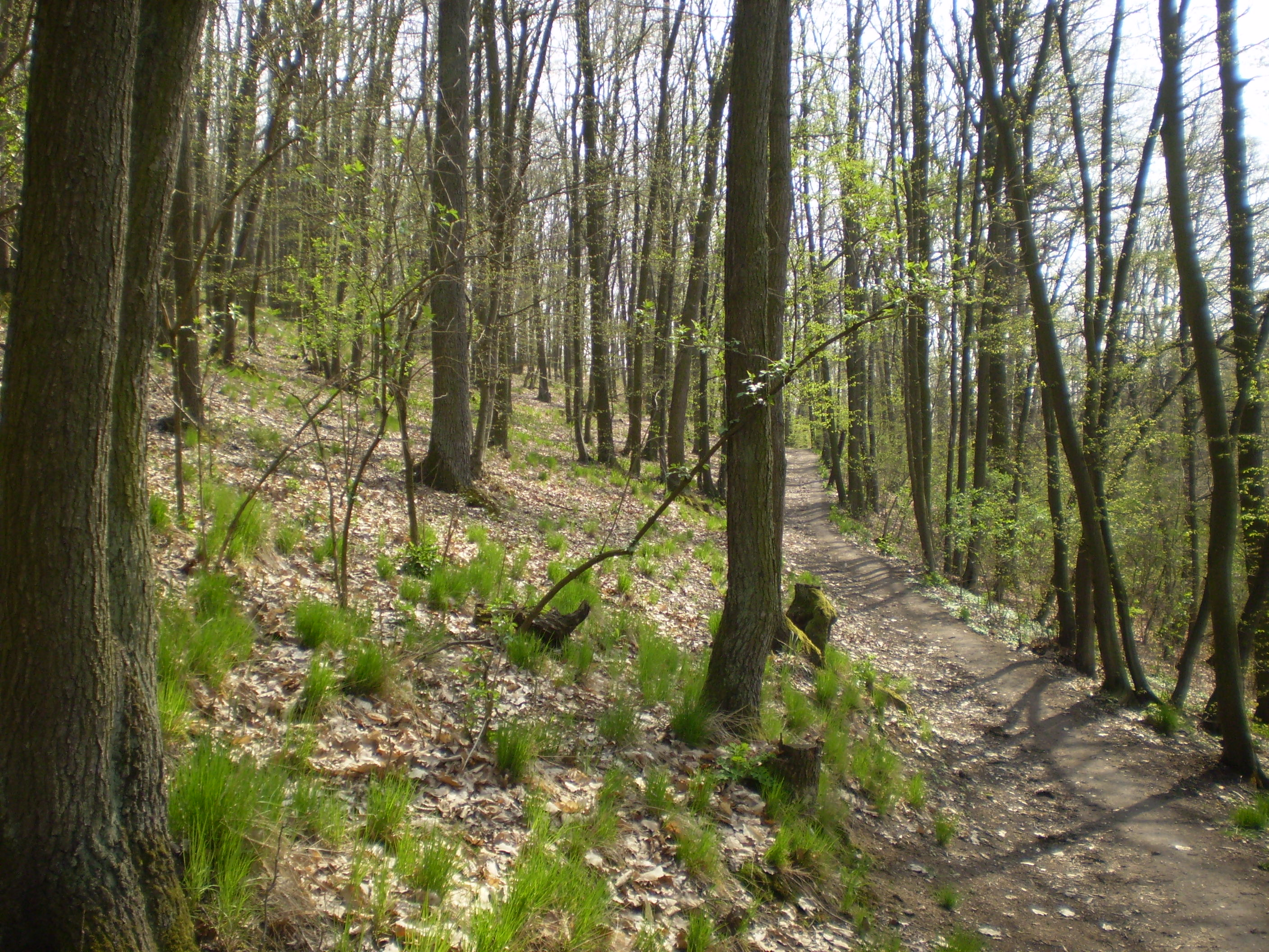 Stezka pro pěší, která vede napříč chráněným územím Pekárna v Brně.